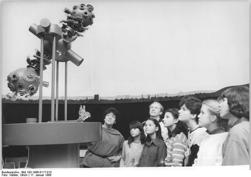 Radebeul, Jugendstunde in Sternwarte ADN-ZB Häßler 17.1.86 Bez. Dresden: Jugendstunde. Bei einem Besuch der Volkssternwarte Adolph Diesterweg in Radebeul lernten Schüler der 59. POS Max Zimmering aus Dresden ein elektronisch gesteuertes ZKP2-Planetarium kennen. Astronomielehrerin Edith Fuchs (l) erläuterte die Arbeitsweise des Geräts unter der Acht-Meter-Demonstrationskuppel. Die 14jährigen bereiten sich mit dieser Besichtigung und ähnlichen Veranstaltungen auf die Jugendweihe vor.